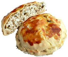 Rustico tradizionale di Manfredonia